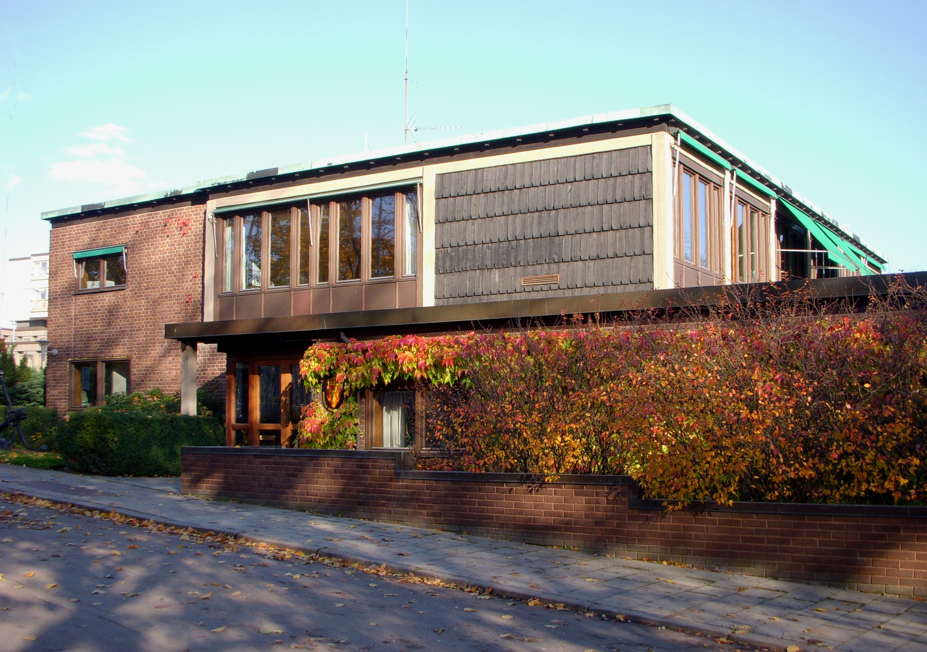 Norges ambassad i Stockholm